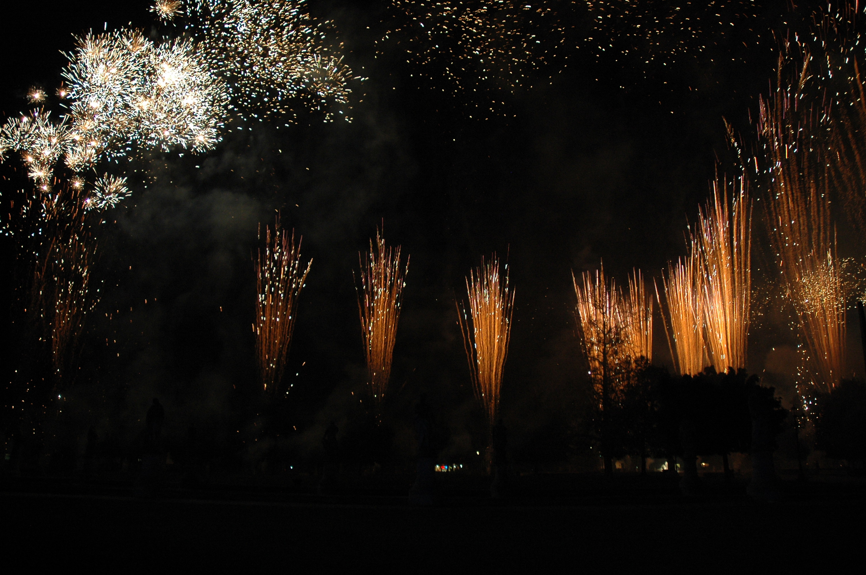 Padova - Ferragosto